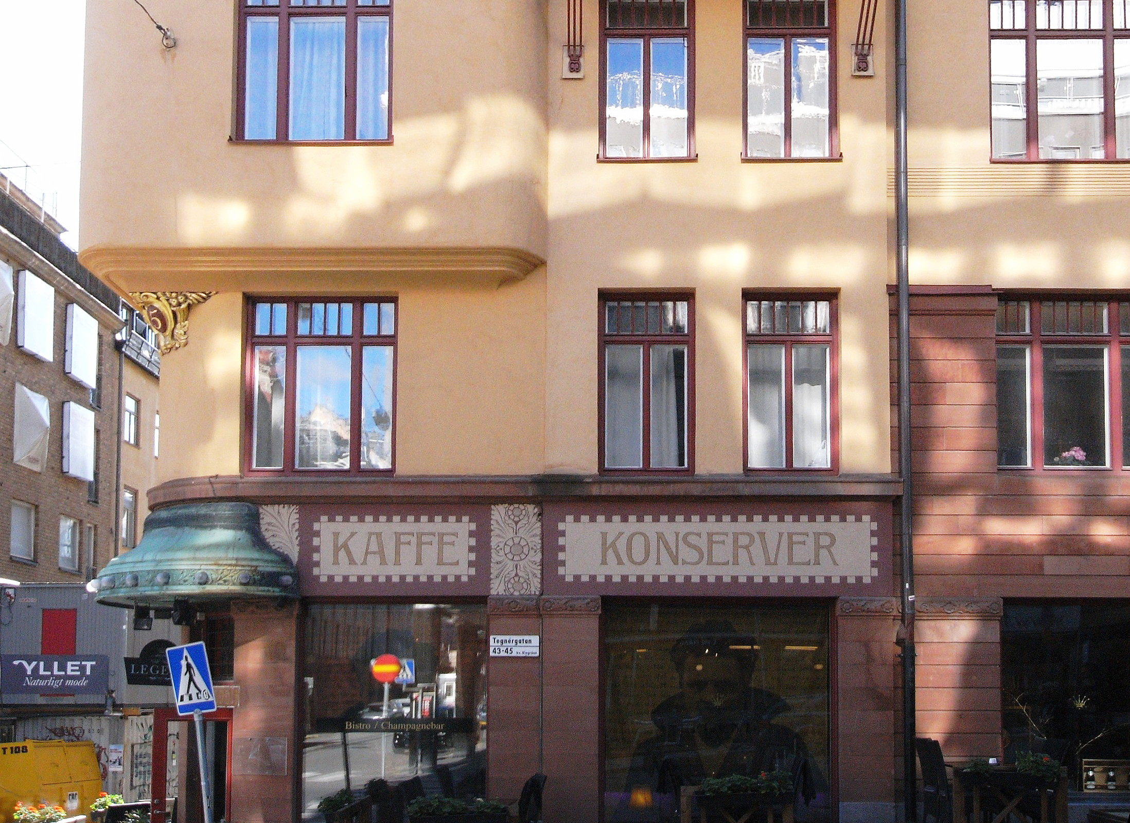 Blå tornet, Strindbergsmuseet (Vingråen 35)